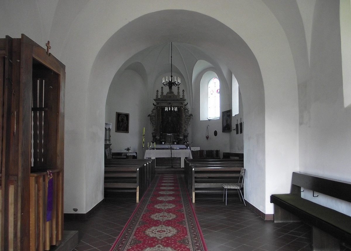 Marcinkowice - rzymskokatolicki kościół parafialny p.w. św. Katarzyny, 1628, XIX/XX